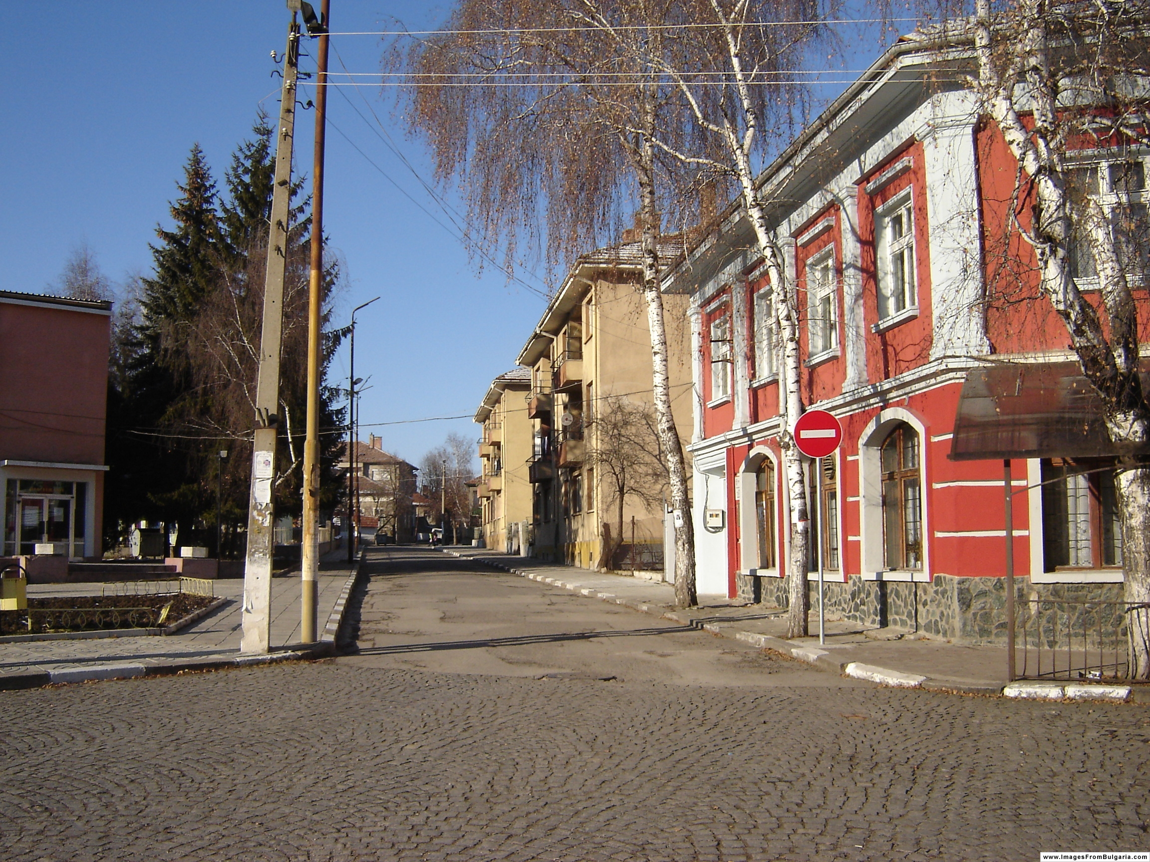 Street in Breznik, Bulgaria